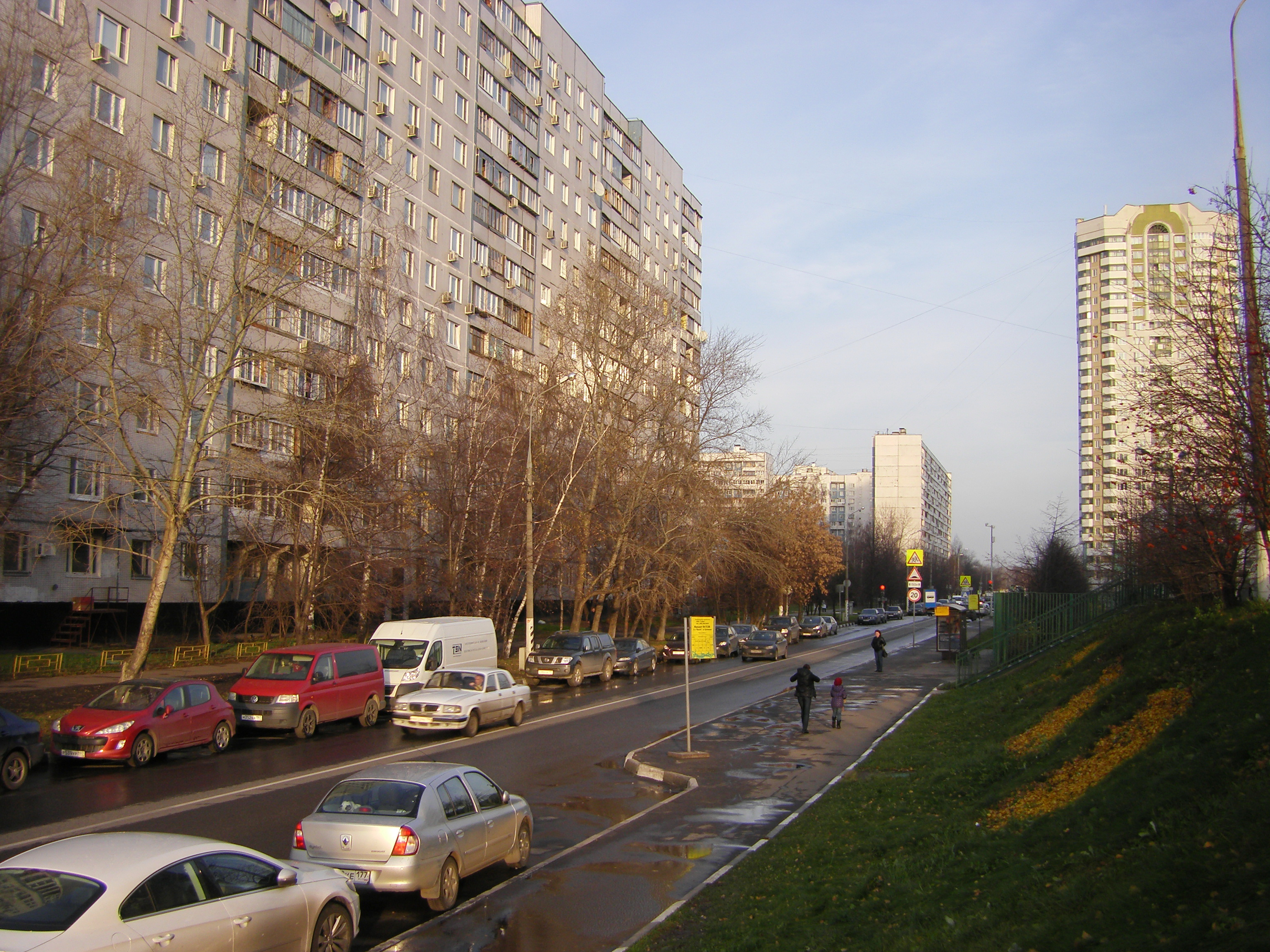 Братеевская улица, слева — дом 33, корпус 1. Снято 6 ноября 2013 года в 16:14 по московскому времени (UTC+4)